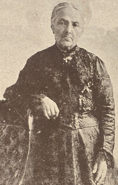 Doña Joaquina Cabrera, madre del presidente guatemalteco, licenciado Manuel Estrada Cabrera